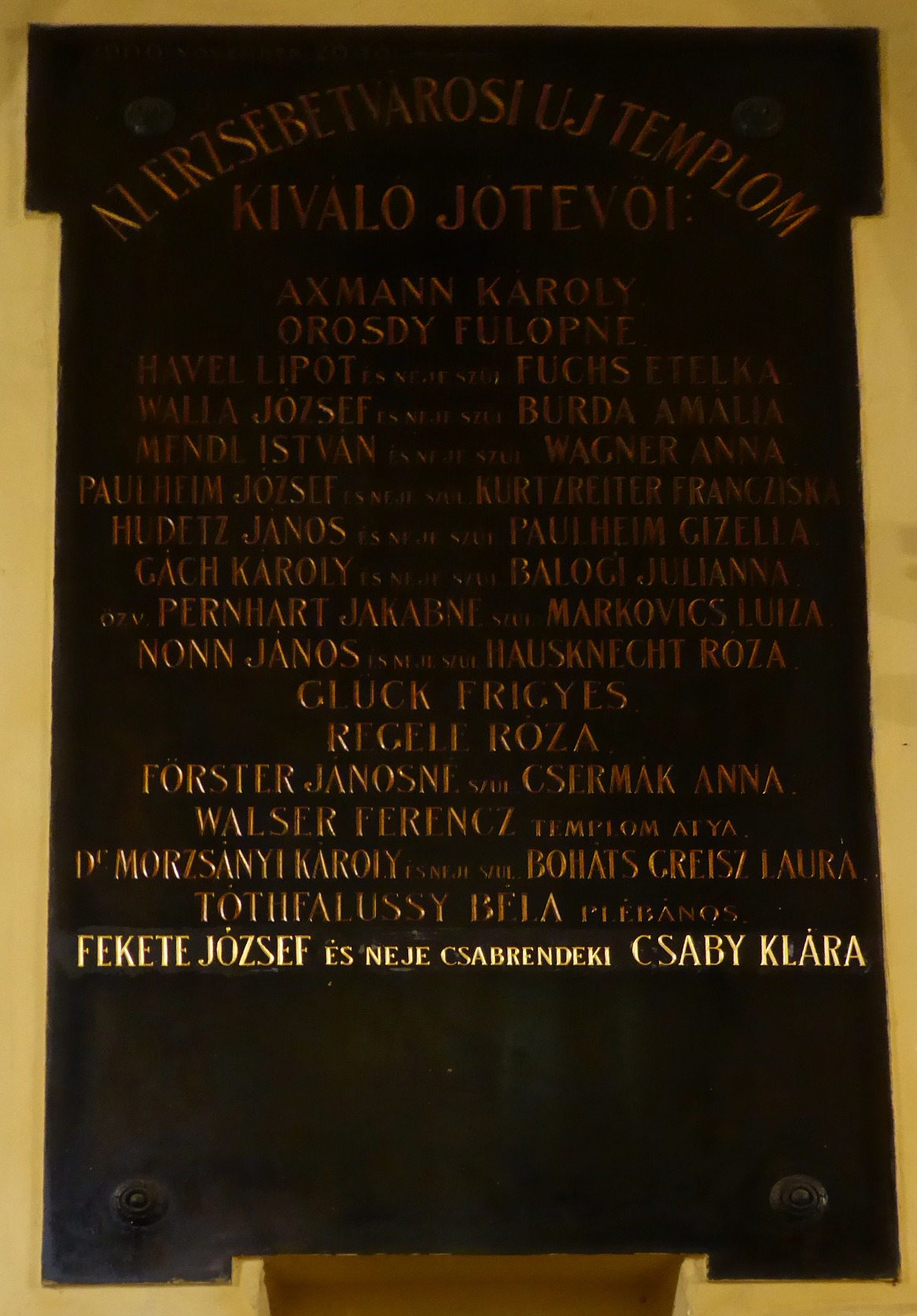 Emléktábla az újabb Árpád-házi Szent Erzsébet római katolikus plébániatemplomban, Budapest VII. kerület, a Rózsák tere közepén. A tábla feltehetően valamikor 1900 és 1945 között készült, de a felirat utolsó sora későbbi. Felirata: Az erzsébetvárosi új templom kiváló jótevői: Axmann Károly Orosdy Fülöpné Havel Lipót és neje szül. Fuchs Etelka Walla József és neje szül. Burda Amália Mendl István és neje szül. Wagner Anna Paulheim József és neje szül. Kurtzreiter Francziska Hudetz János és neje szül. Paulheim Gizella Gách Károly és neje szül. Balogh Julianna özv. Pernhart Jakabné szül. Markovics Lujza Nonn János és neje szül. Hausknecht Róza Glück Frigyes Regele Róza Förster Jánosné szül. Csermák Anna Walser Ferencz templom atya Dr. Morzsányi Károly és neje szül. Boháts Greisz Laura Tóthfalussy Béla plébános Fekete József és neje csabrendeki Csaby Klára A fényképet digitálisan módosítottam, hogy a felirat egy kicsit könnyebben olvasható legyen. Az eredetijét 2017-09-16-n készítettem. Ugyanerről a tábláról másik fénykép: File:RozsakTereFotoThalerTamas12.jpg.